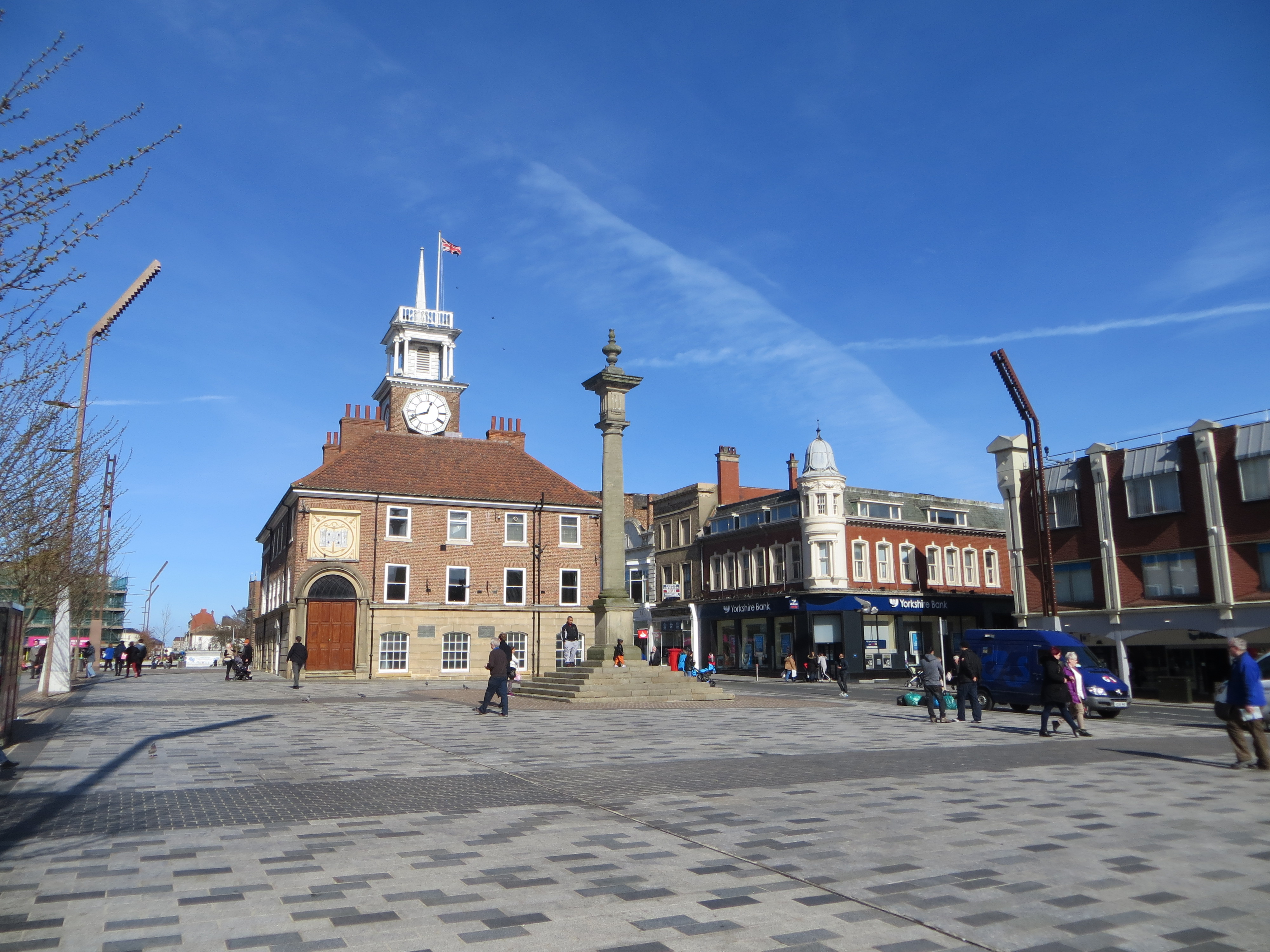 Stockton-on-Tees